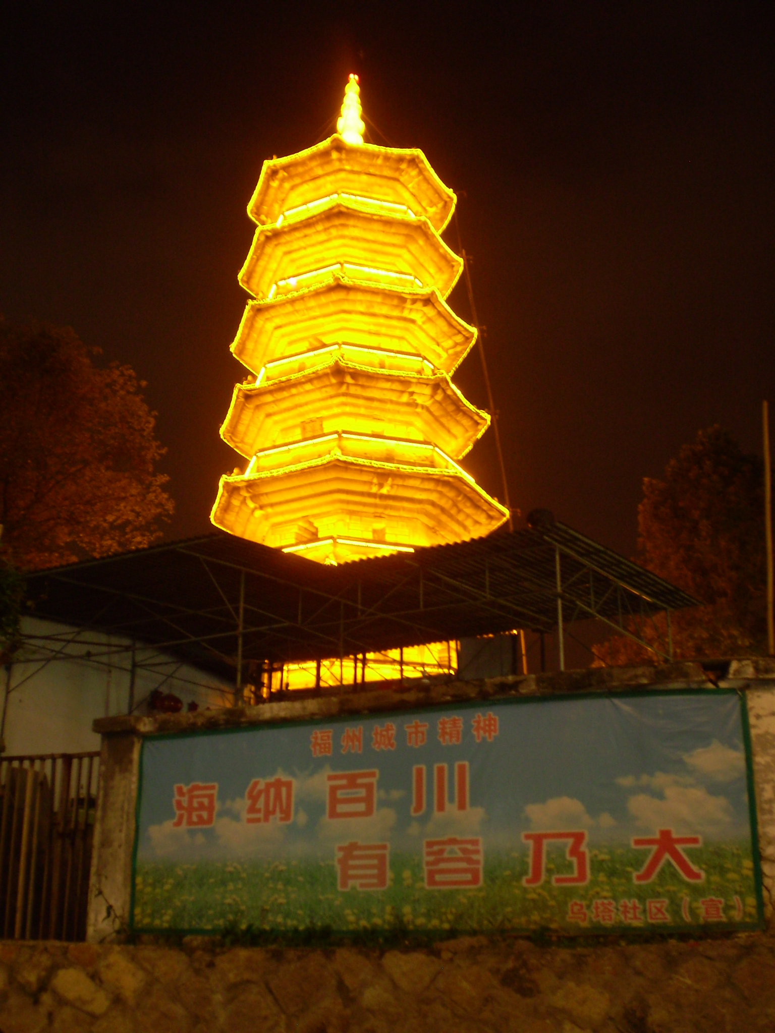 福州烏塔(夜間), 其下方有福州市城市精神標語, 「海納百川，有容乃大」, 與中文維基所使用的精神標語一樣